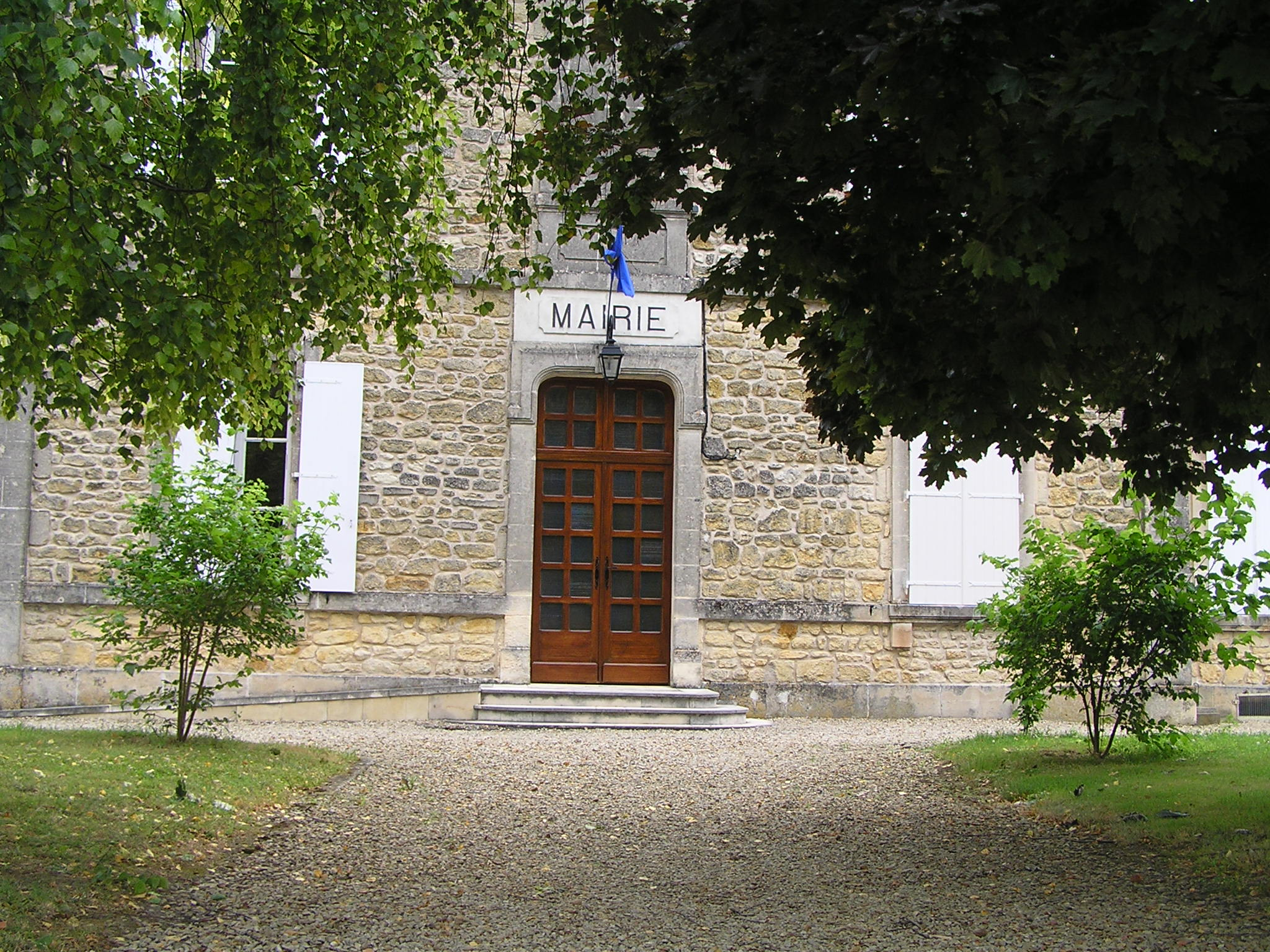 mairie de Mainxe